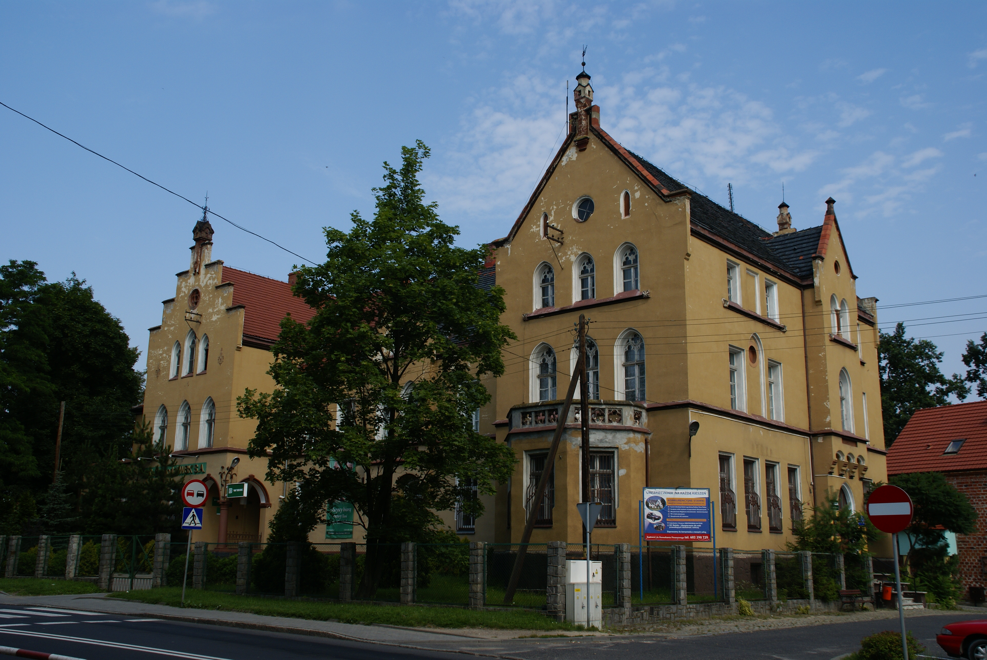 dom, widok od frontu Niemodlin, Rynek 34, Niemodlin 04.1966.